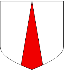 D'argent à une pointe de gueules